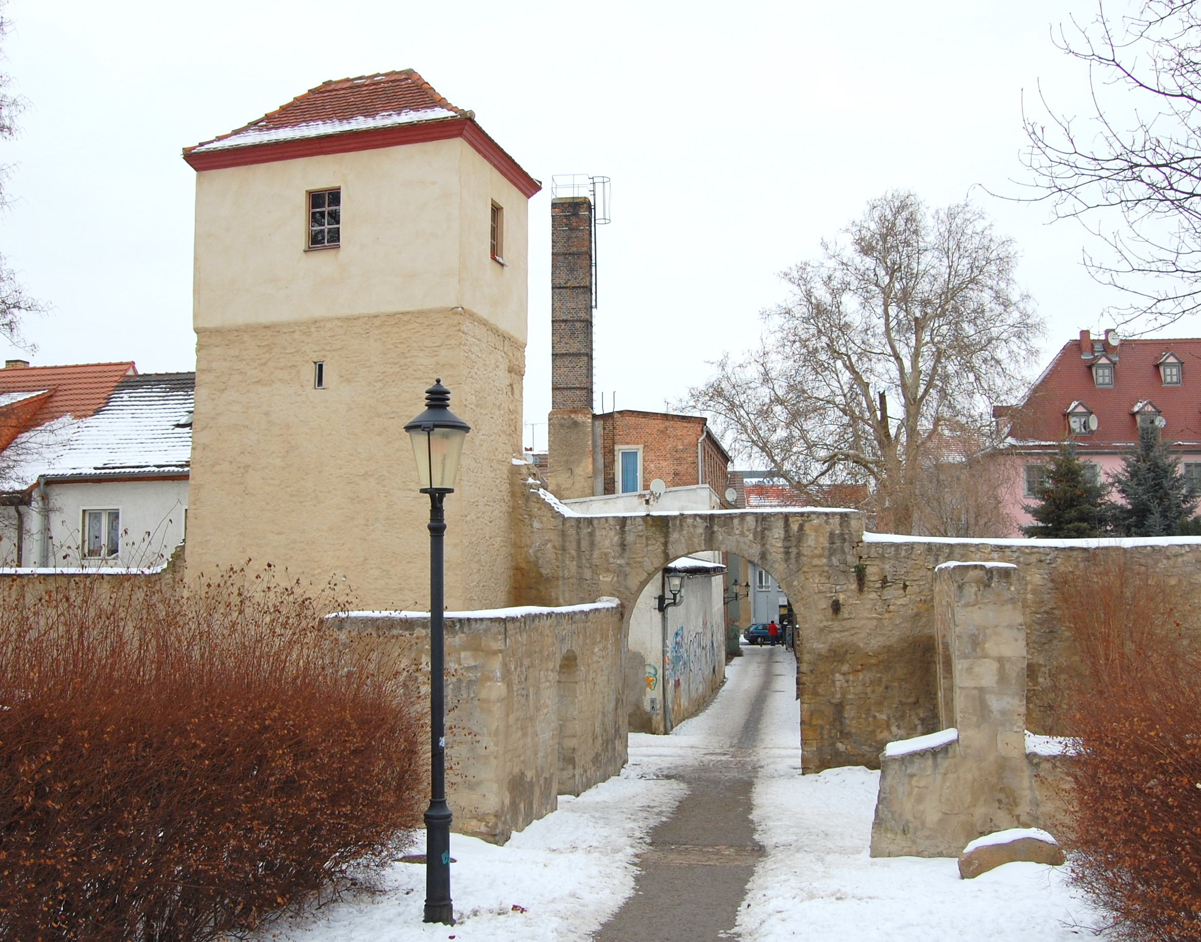 Wasserkunst, Mauerturm mit Wenzelsmauer in Naumburg